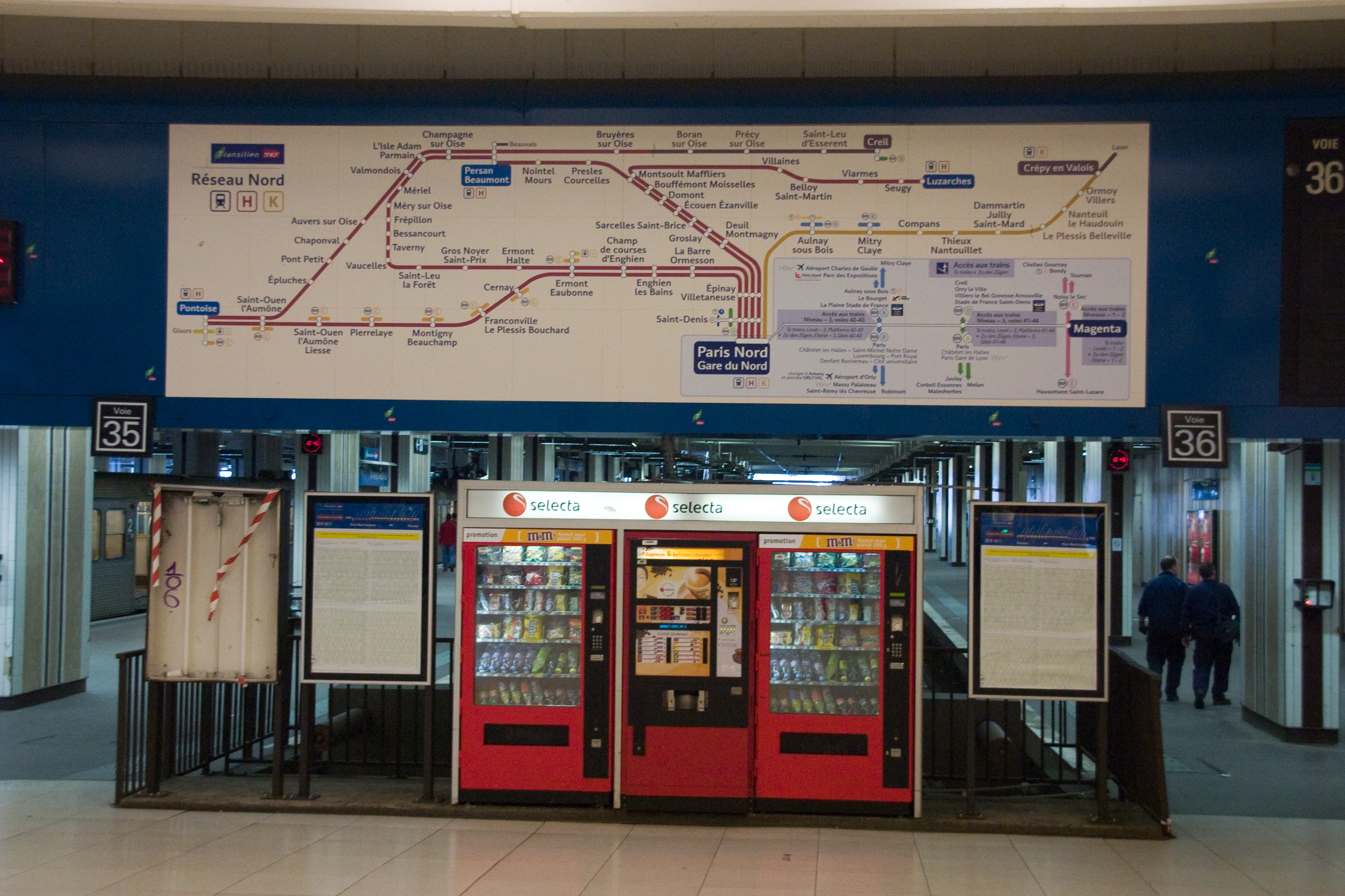 Gare du Nord, Paris, France